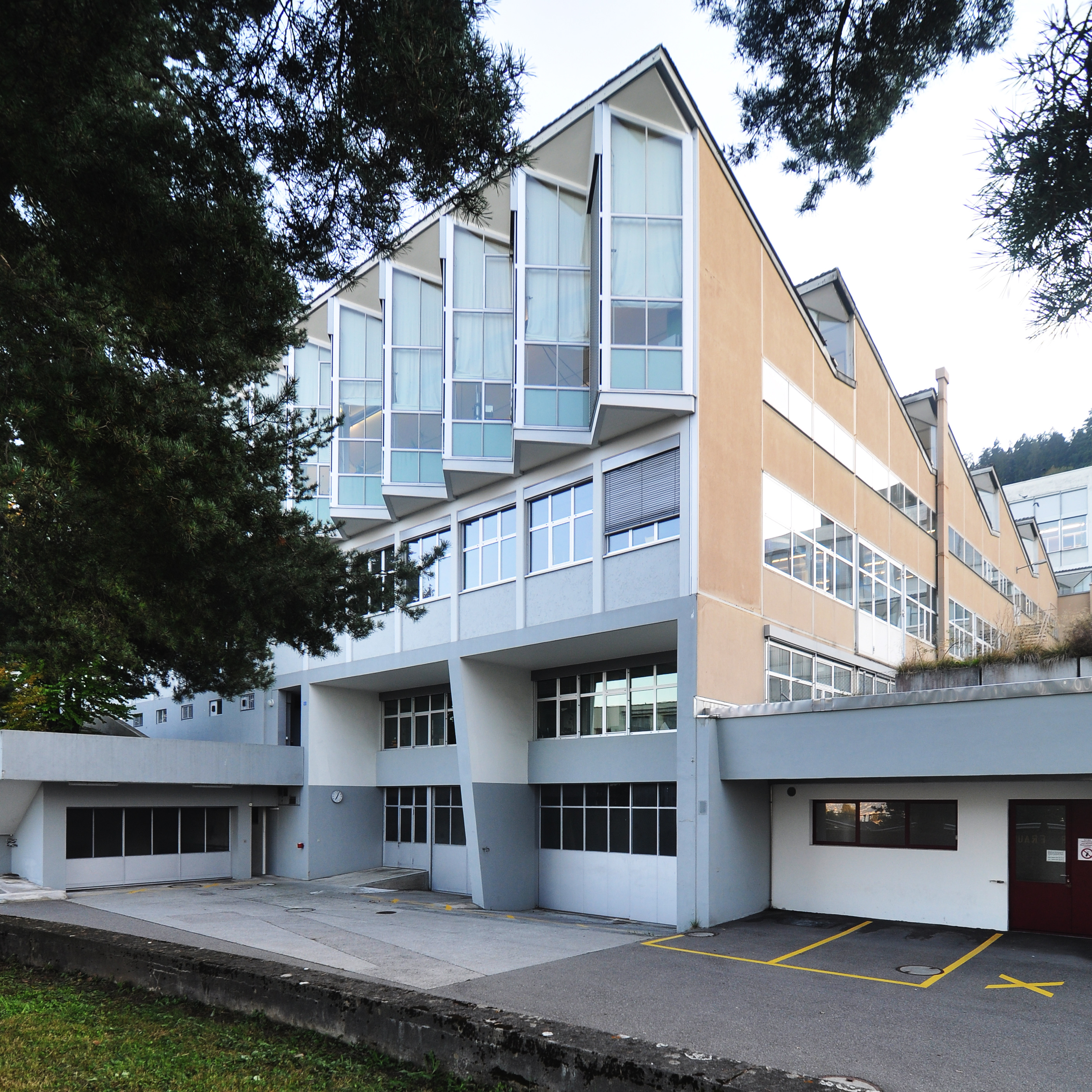 Erweiterung der Feller AG, Horgen, Architekt: Hans Fischli